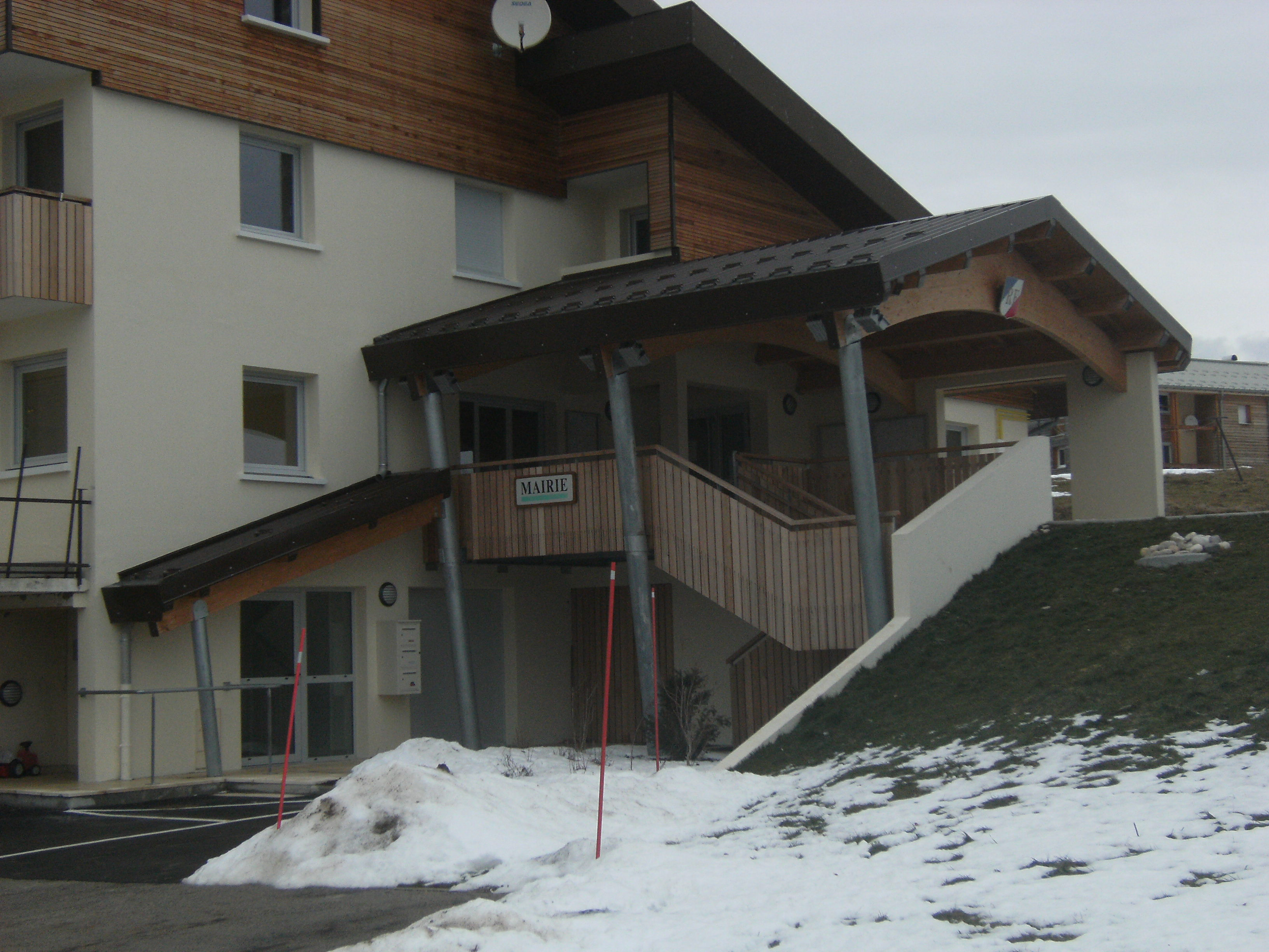 Mairie de Lajoux (Jura, France)